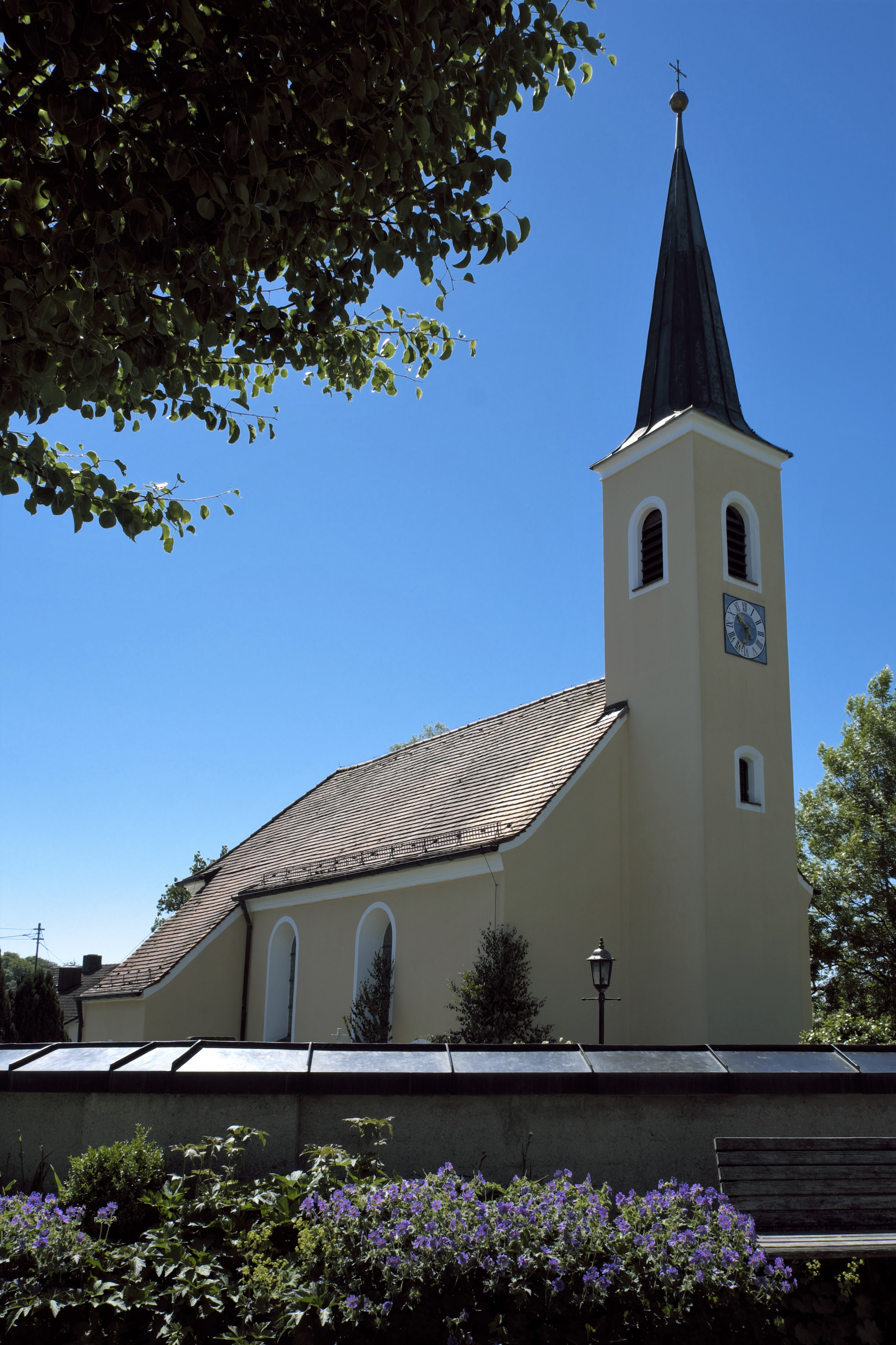 Katholische Filialkirche St. Bartholomäus in Maising (Pöcking) im Landkreis Starnberg (Bayern, Deutschland)